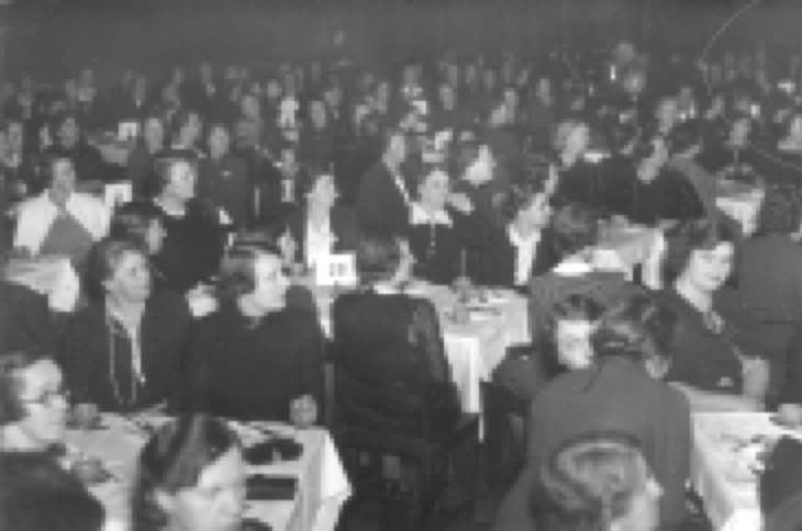 Medlemmarna i Göteborgs kvinnliga diskussionsklubb diskuterar bostadsfrågan 1939